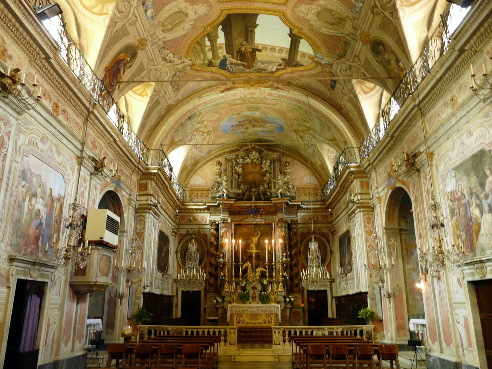 Navata centrale, oratorio dei Santi Sebastiano e Rocco, Campo Ligure, Liguria, Italia